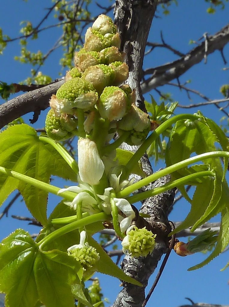 Liquidambar styraciflua (Liquidámbar) : Pedúnculo floral masculino y flores femeninas péndulas - Plaza de Felipe II, Madrid (España).